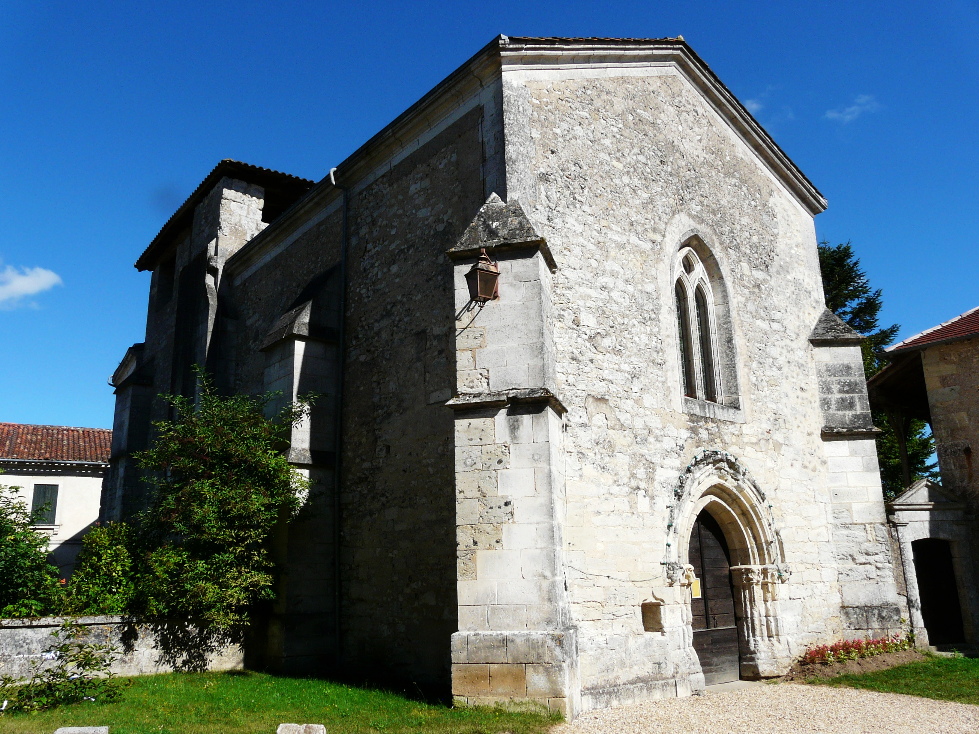 Église Saint Blaise d'Annesse, Annesse-et-Beaulieu,, Dordogne, France